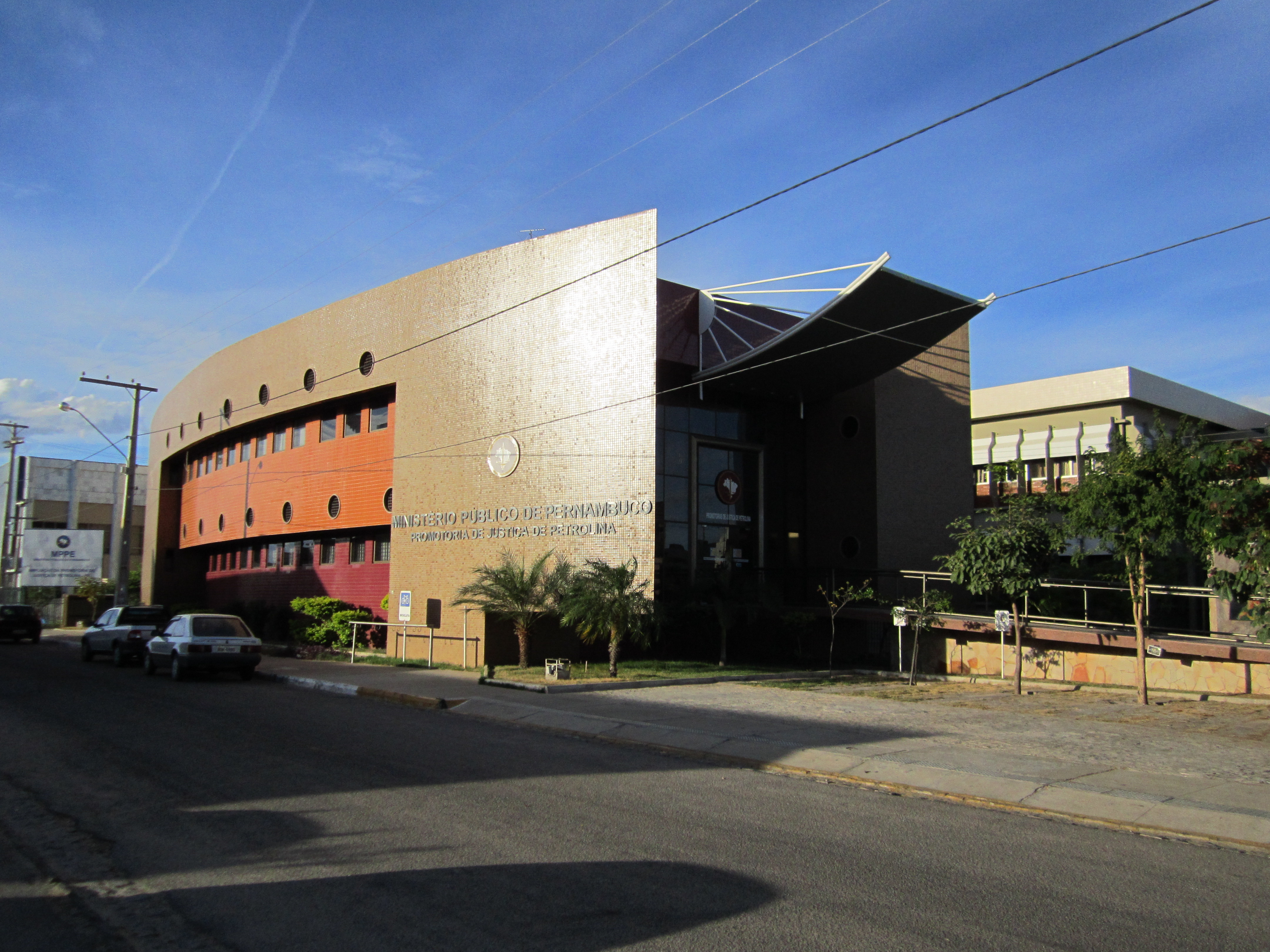 Promotoria de Justiça - Petrolina, Pernambuco, Brasil